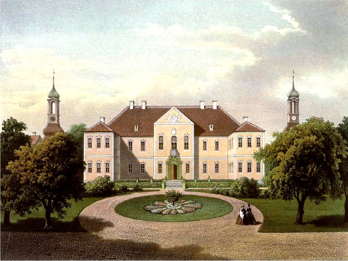 Schloss Boyadel, Lithografie aus dem 19. Jahrhundert